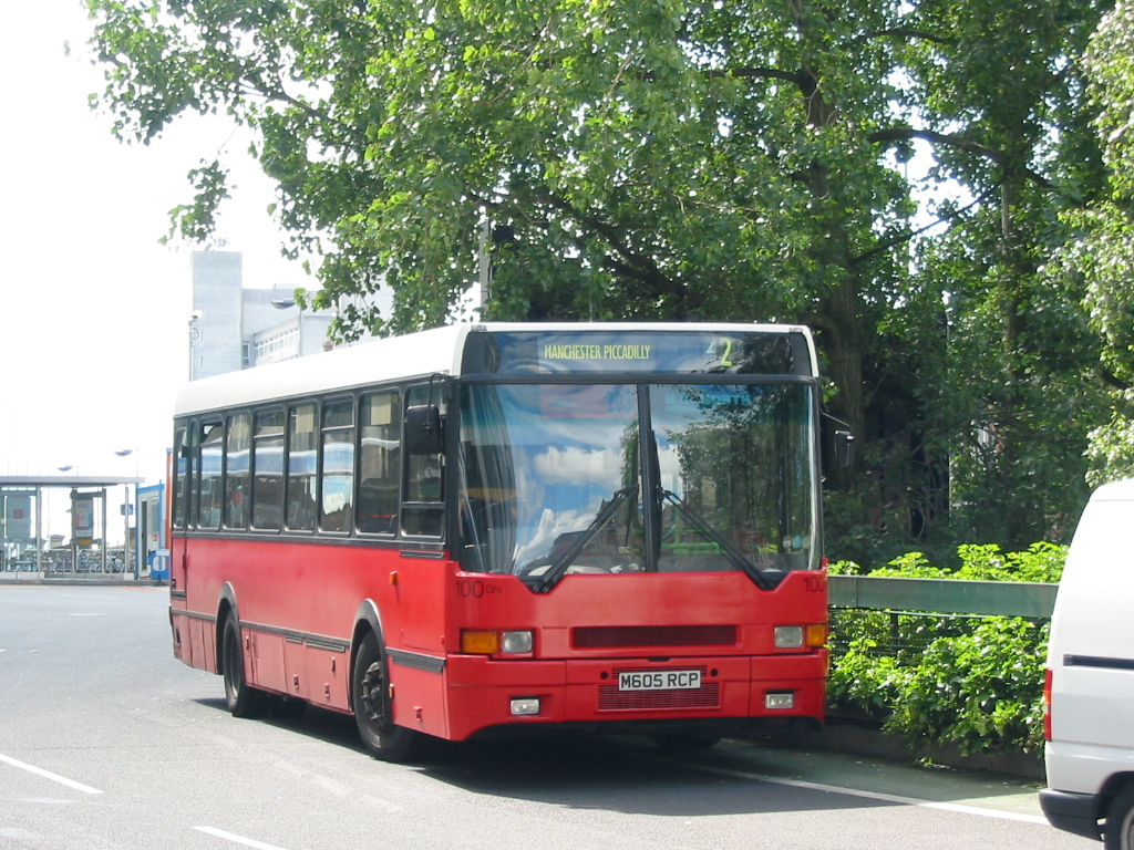 UKN M605RCP 2004-07-05